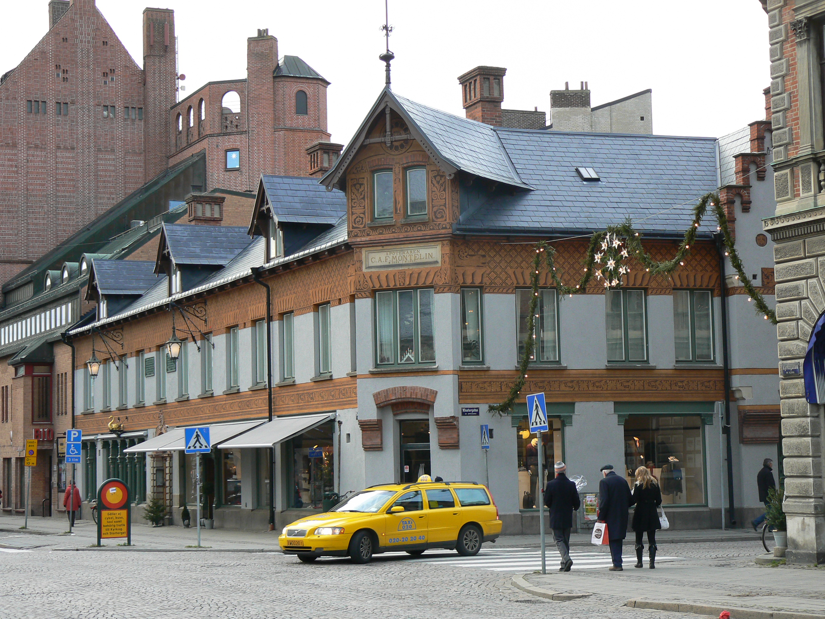 Apoteket Svanen. hela byggnaden i hörnet av Klostergatan och Kyrkogatan i Lund.